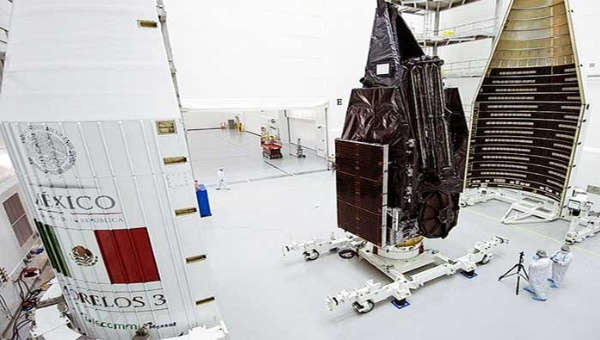 Punta del cohete Morelos III siendo montada.